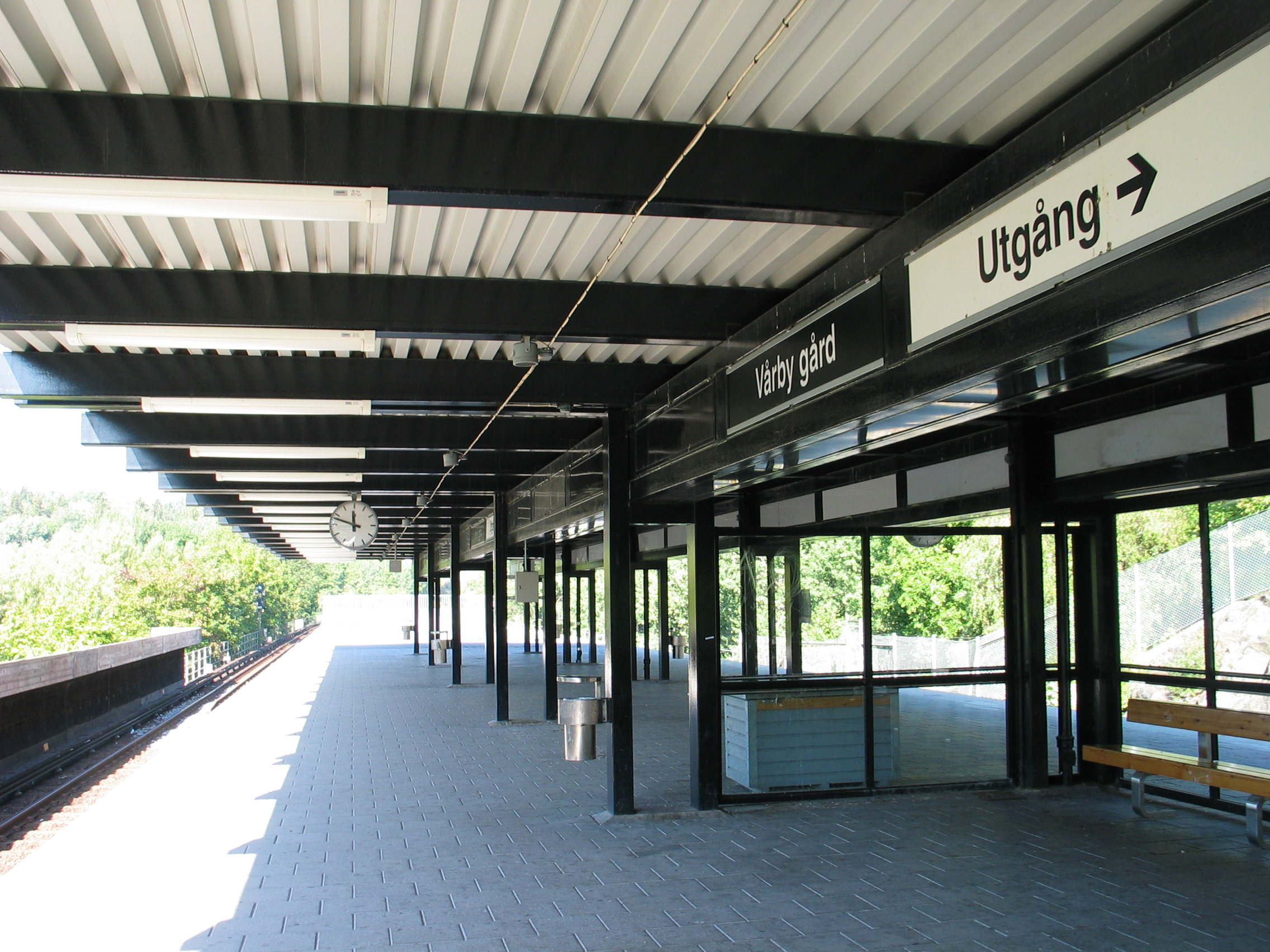 Vårby gård, a metro station in Stockholm, Sweden.